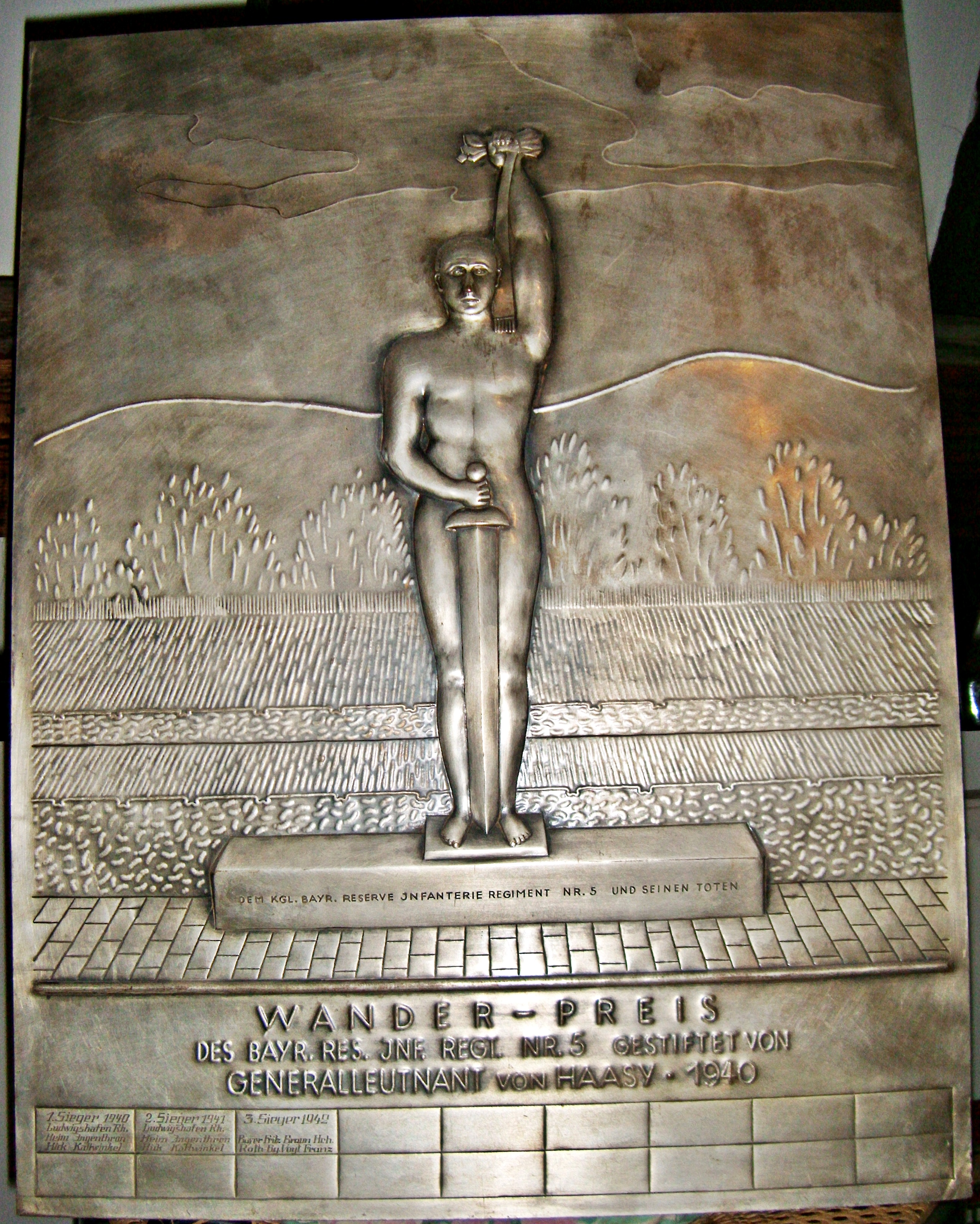 Wilhelm von Haasy, bayerischer General, Wanderpreis für die Regimentsvereinigung des 5. Bay. Reserve-Infanterie-Regiments, 1940